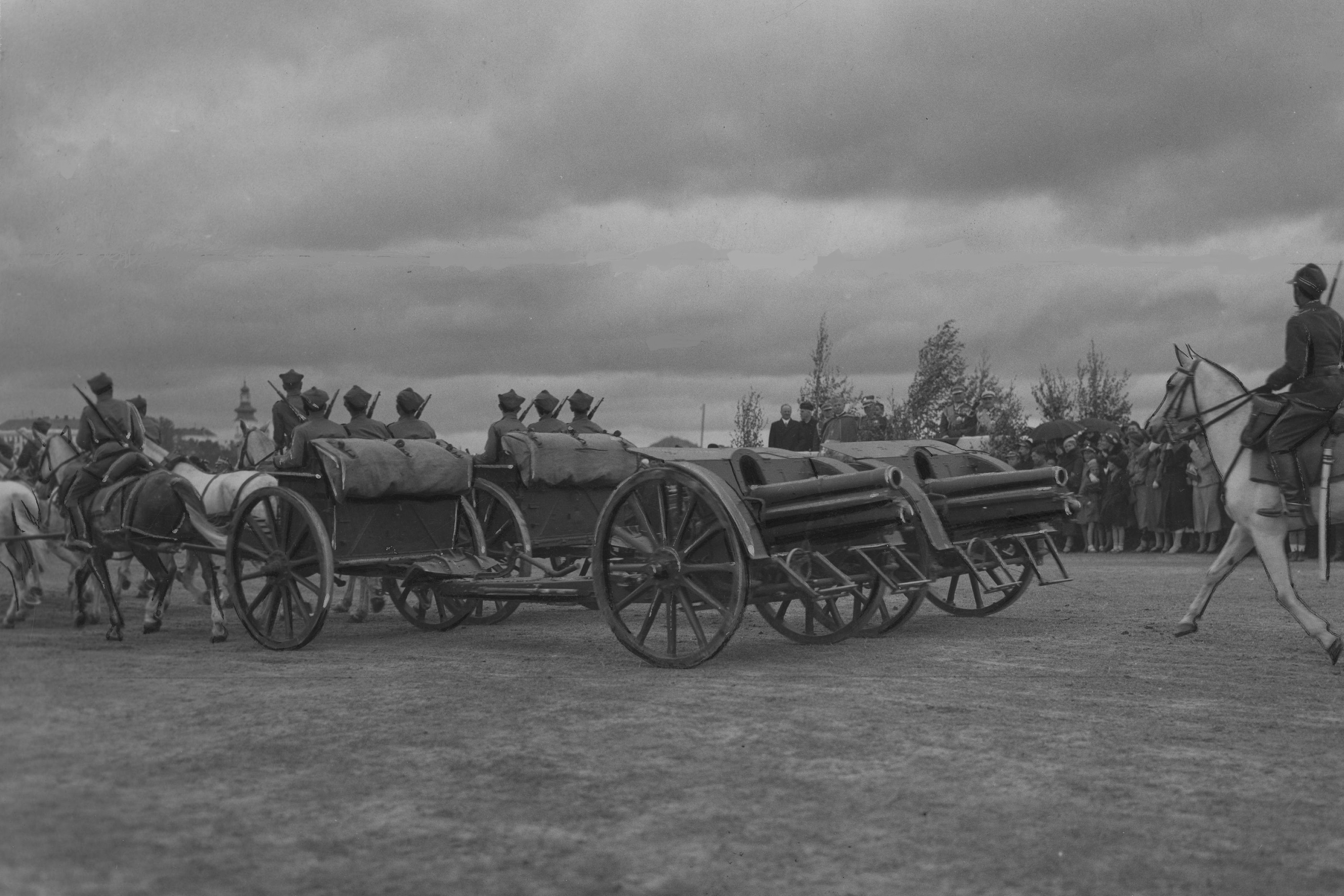 15 lecie 3 Pułku Artylerii Lekkiej Legionów. Fragment defilady haubic wz. 1914/1919 wz. 1914 kal. 100 mm z przodkami.